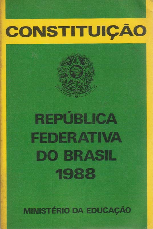 Capa da constituição do Brasil de 1988 exemplar distribuído pelo Ministério da Educação-MEC.